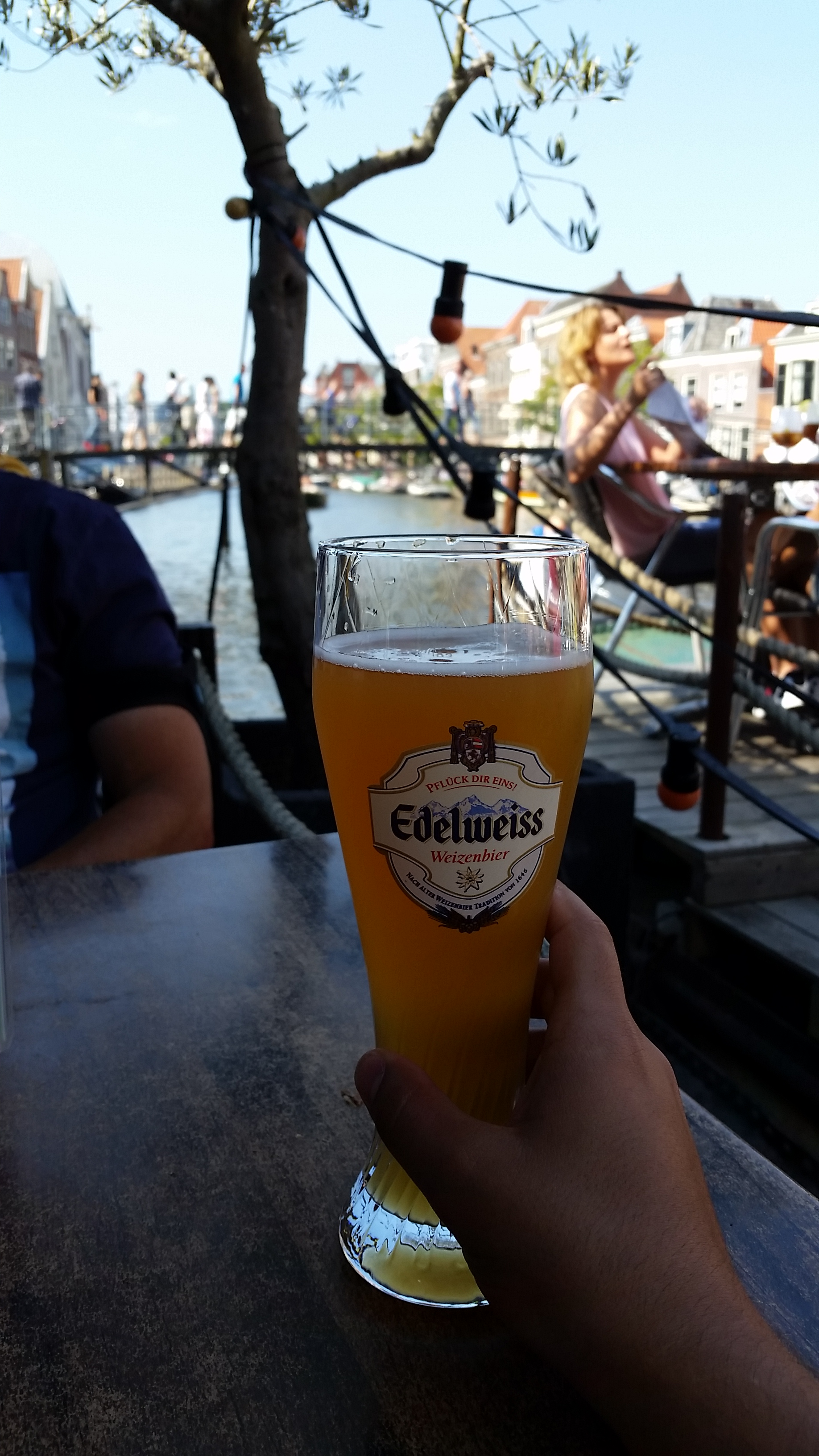 בירת אדלווייס